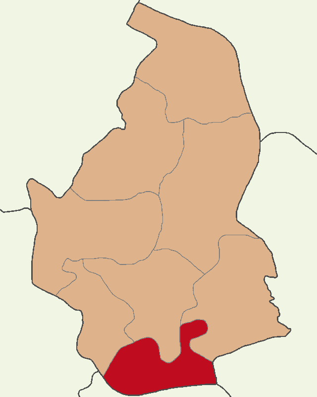 Derinkuyu ilçesinin konumu